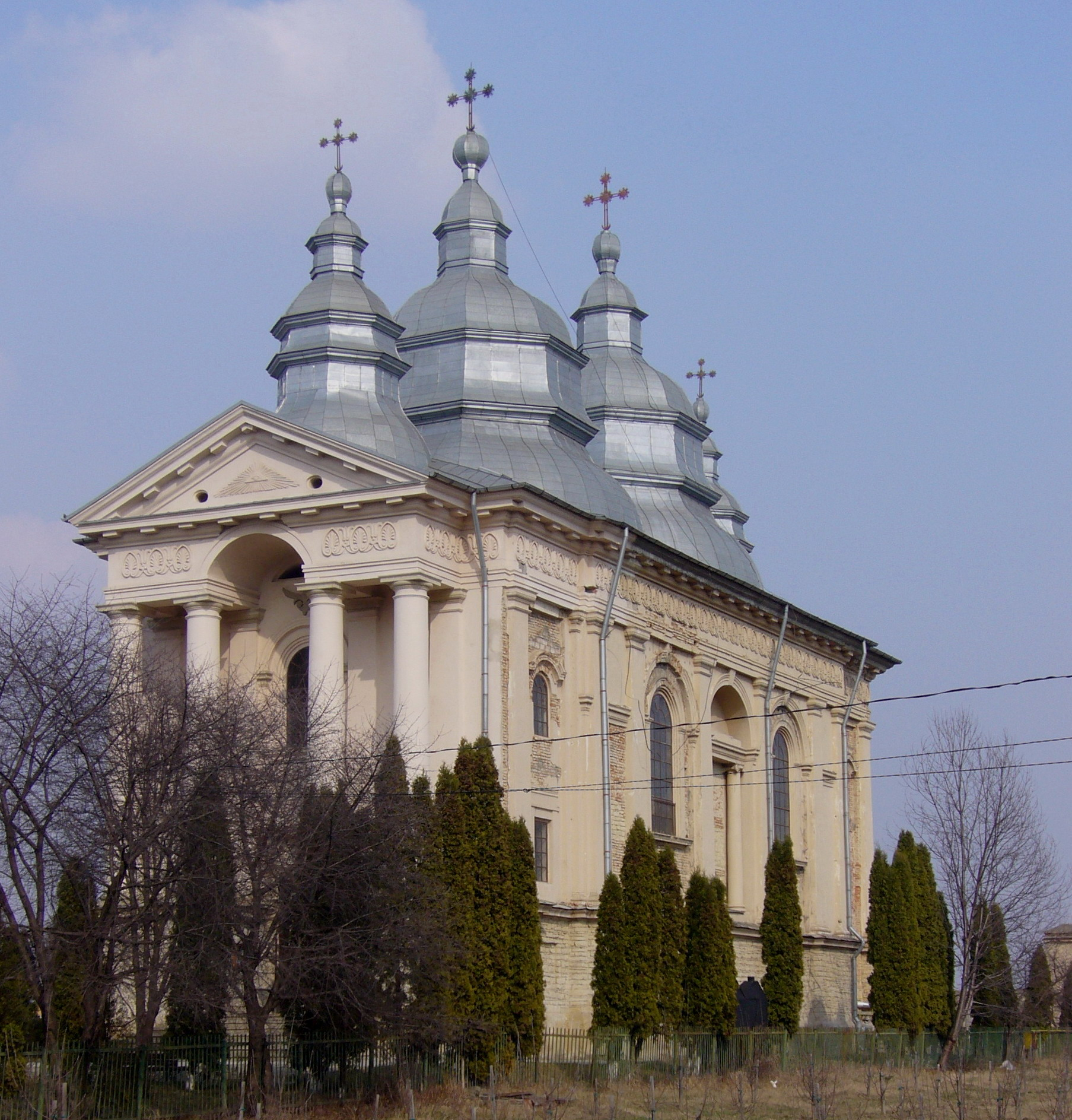 Mănăstirea Frumoasa